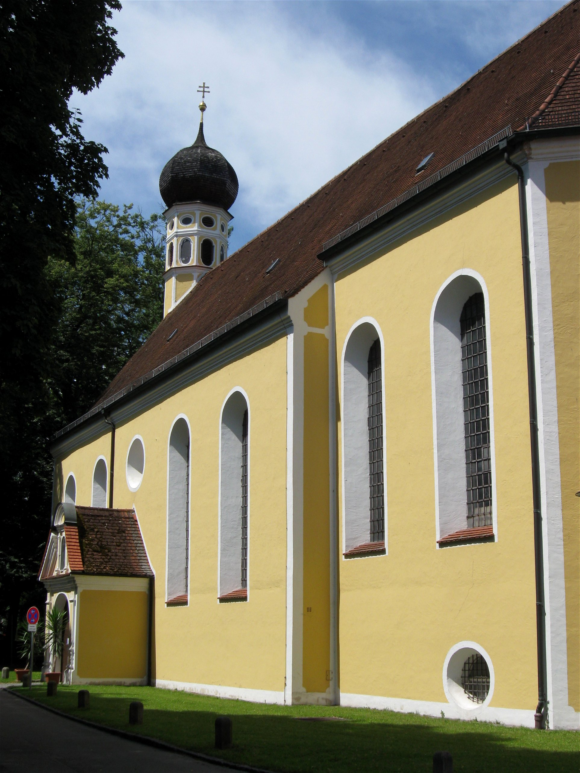 Kath. Wallfahrtskirche Hl. Blut , 1675 von Hans Kogler erbaut; mit Ausstattung; oktogene Brunnenkapelle, um 1700; mit Ausstattung.